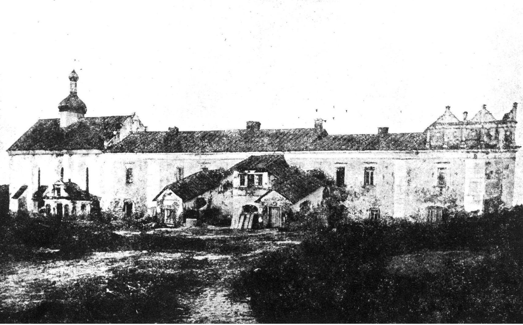 Вид замку.